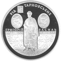 Монета рід Тарновських реверс